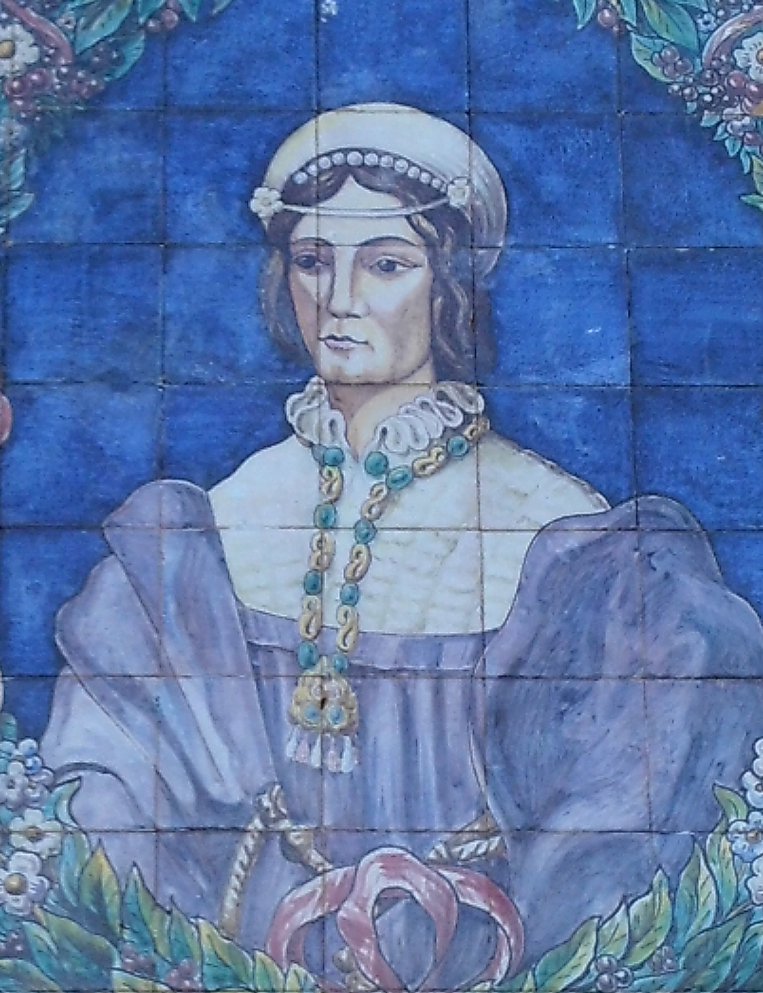 Azulejo con un retrato de Catalina de Ribera. Se encuentra el monumento a Catalina de Ribera del paseo homónimo. Fue realizado en 1921 por Manuel de la Cuesta y Ramos.